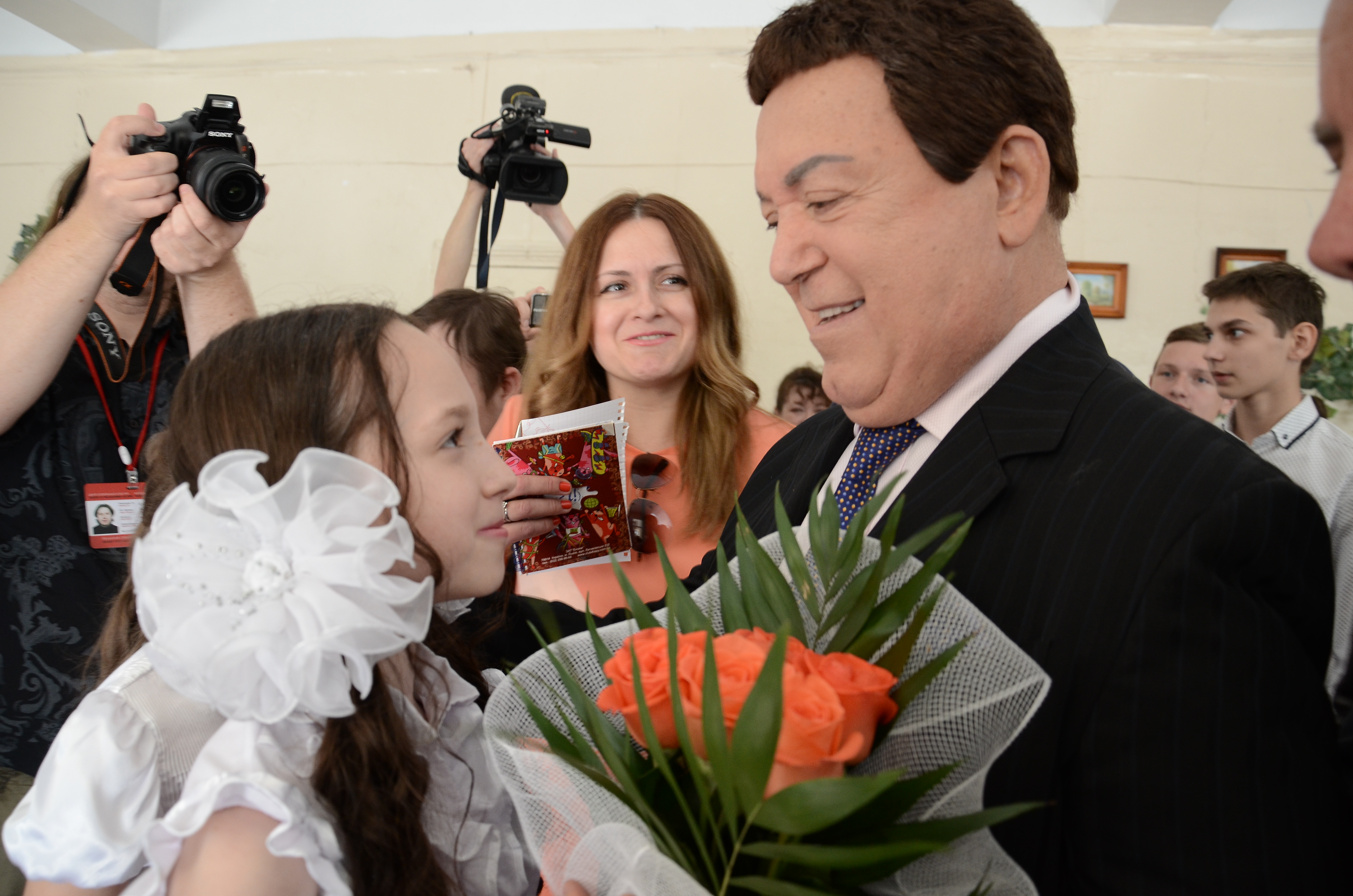 Последний звонок в 47 школе Донецка.